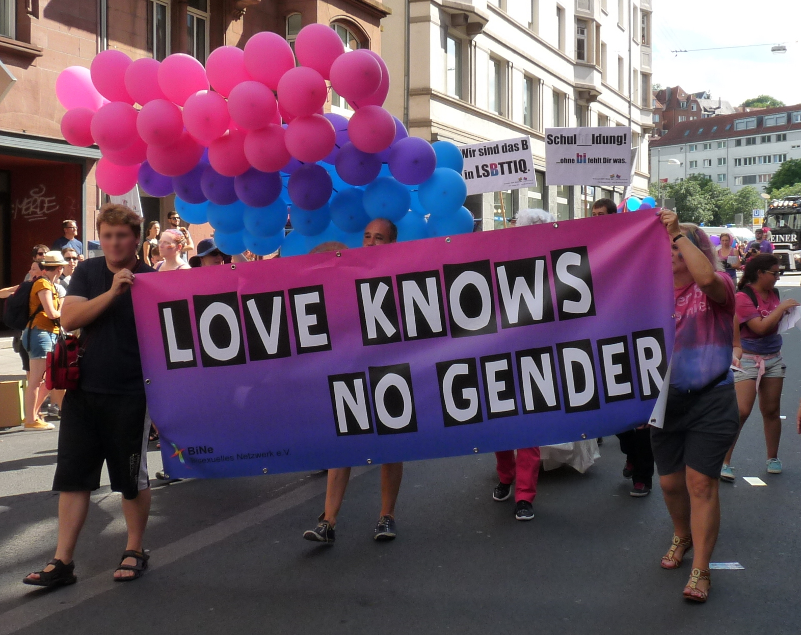 Stuttgart - CSD 2016 - Bisexuelle in Baden Württemberg